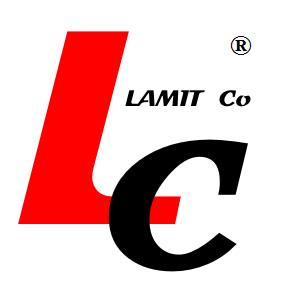 Lamit Company logo